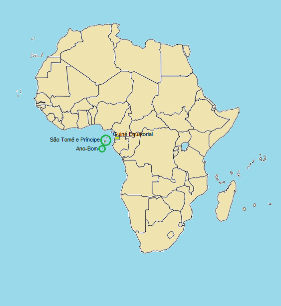 Português do Brasil: Localização dos crioulos do Golfo da Guiné